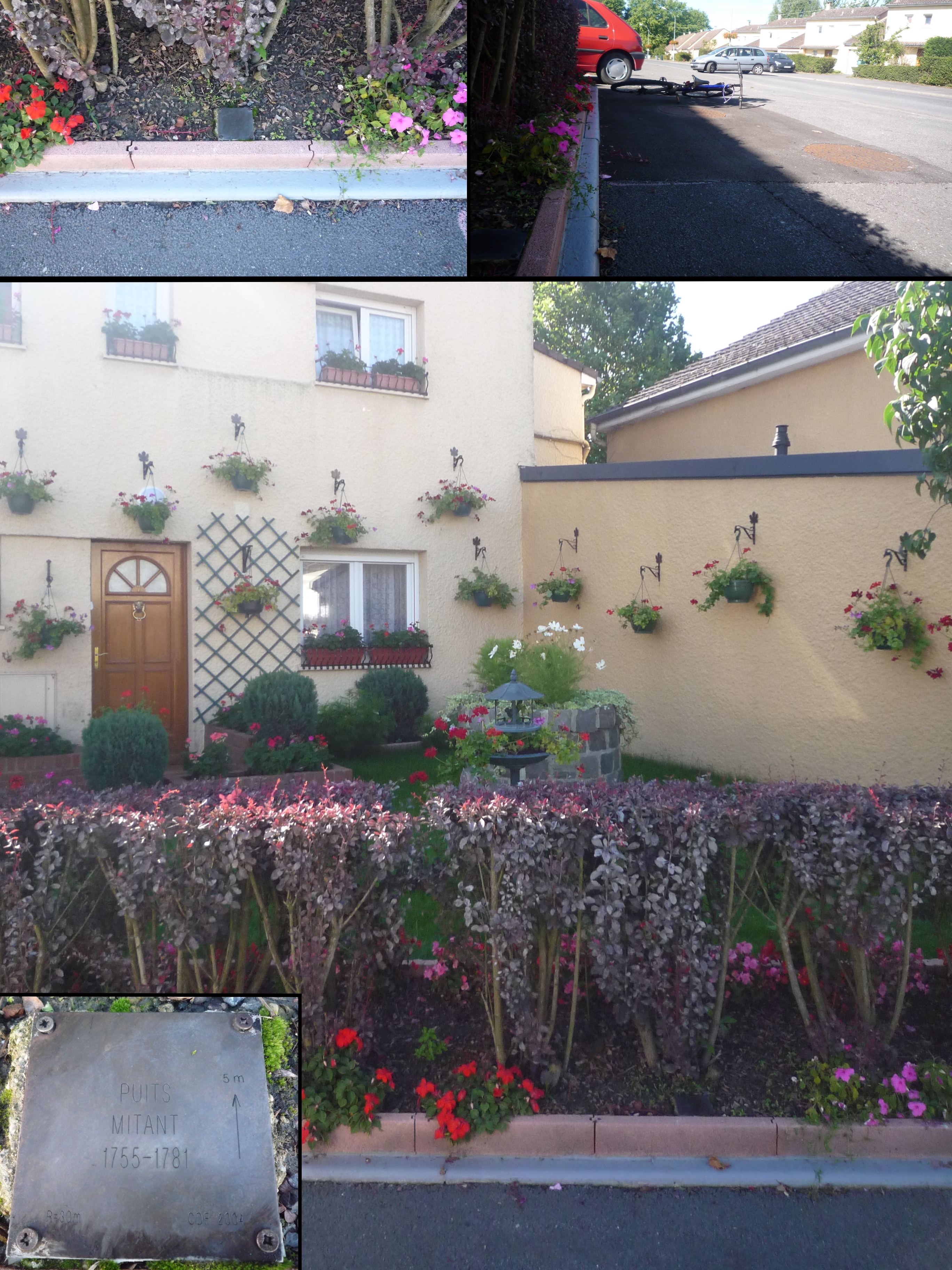 Puits Mitant de la Compagnie des mines d'Anzin situé à Valenciennes, Nord, Nord-Pas-de-Calais, France. Une autre fosse Mitant existait, mais elle était située sur le territoire d'Anzin